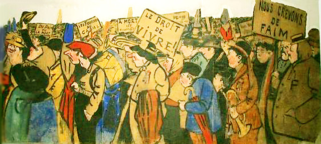 Dessin de Pierre Dantoine sur les manifestations du Languedoc en 1907